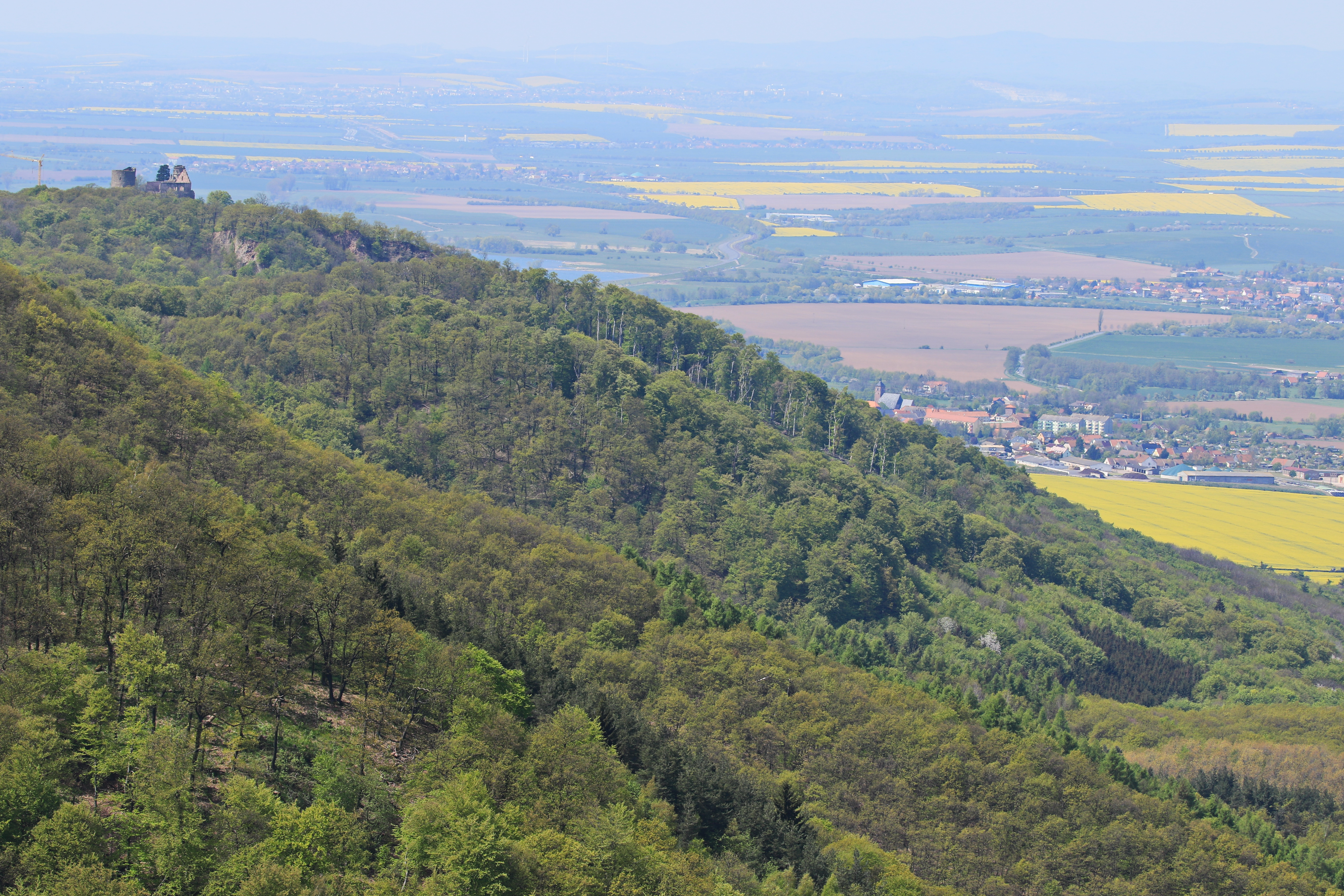 Kyffhäuser in Thüringen im Frühling 2016: Blick nach Nordwesten über den Wald im Naturschutzgebiet „Rothenburg“ (innerhalb des LSGs Kyffhäuser/ST und im Naturpark Kyffhäuser), oben links die Ruine der Rothenburg; Bereiche im Hintergrund überwiegend in Sachsen-Anhalt, rechts der Ort Kelbra.